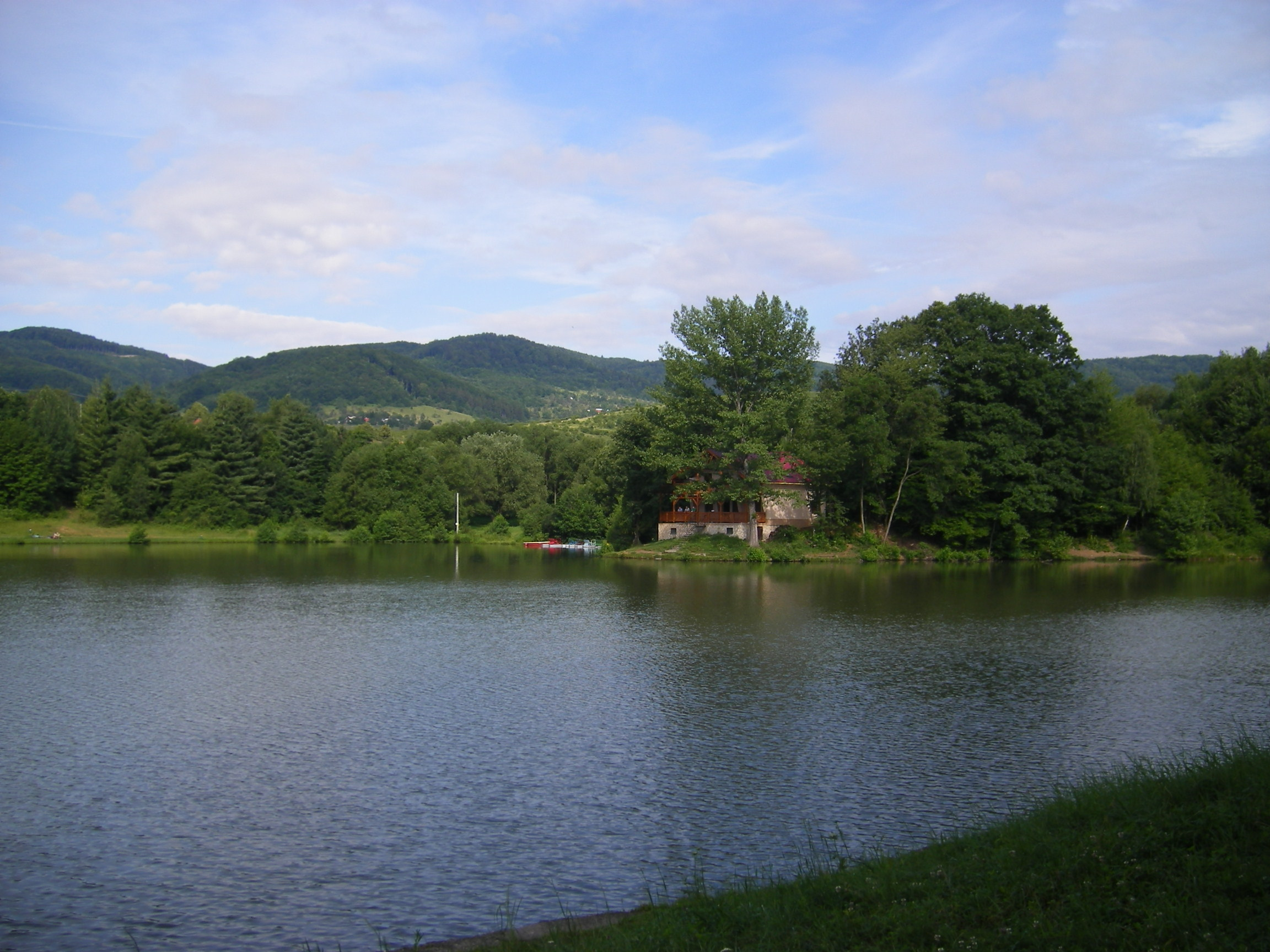 Nová Baňa (ZC) Lake Tajch